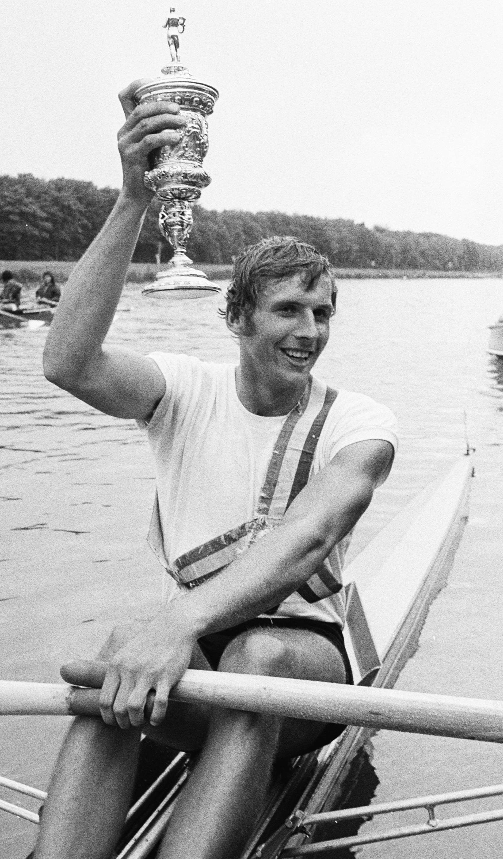 Internationale Roeiwedstrijden op de Bosbaan, Holland Beker 1979; winnaar R. Reiche, DDR National Mannschaft (Oost-Duitsland)